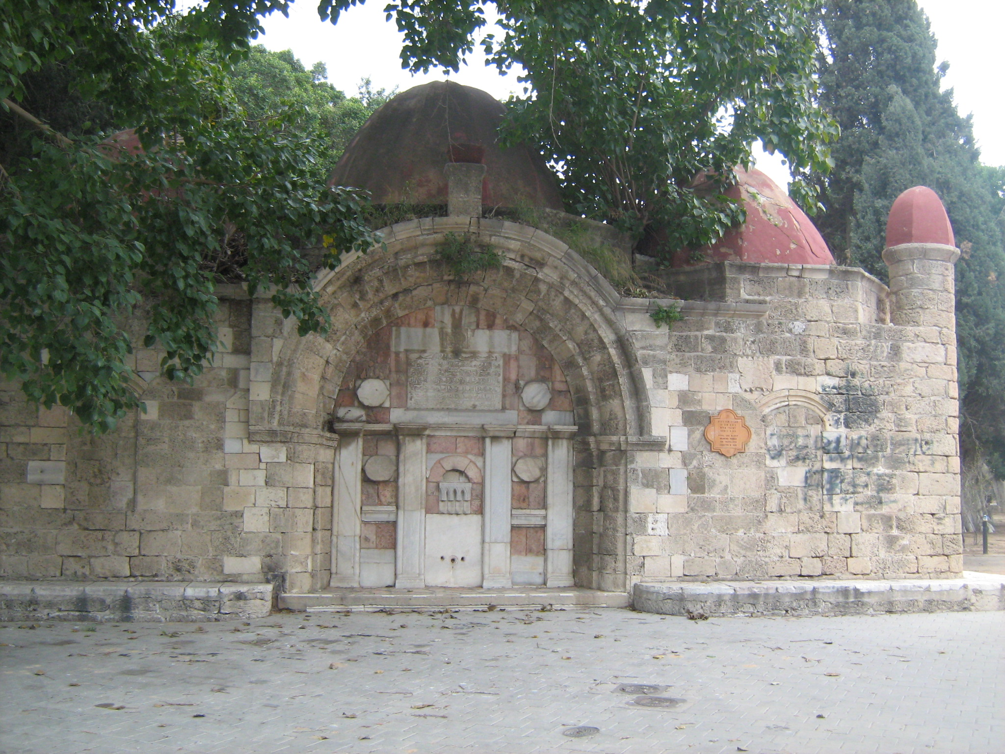 סביל אבו נבוט בדרך בן צבי